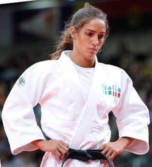 Giulia Quintavalle in gara ai Giochi Olimpici 2012